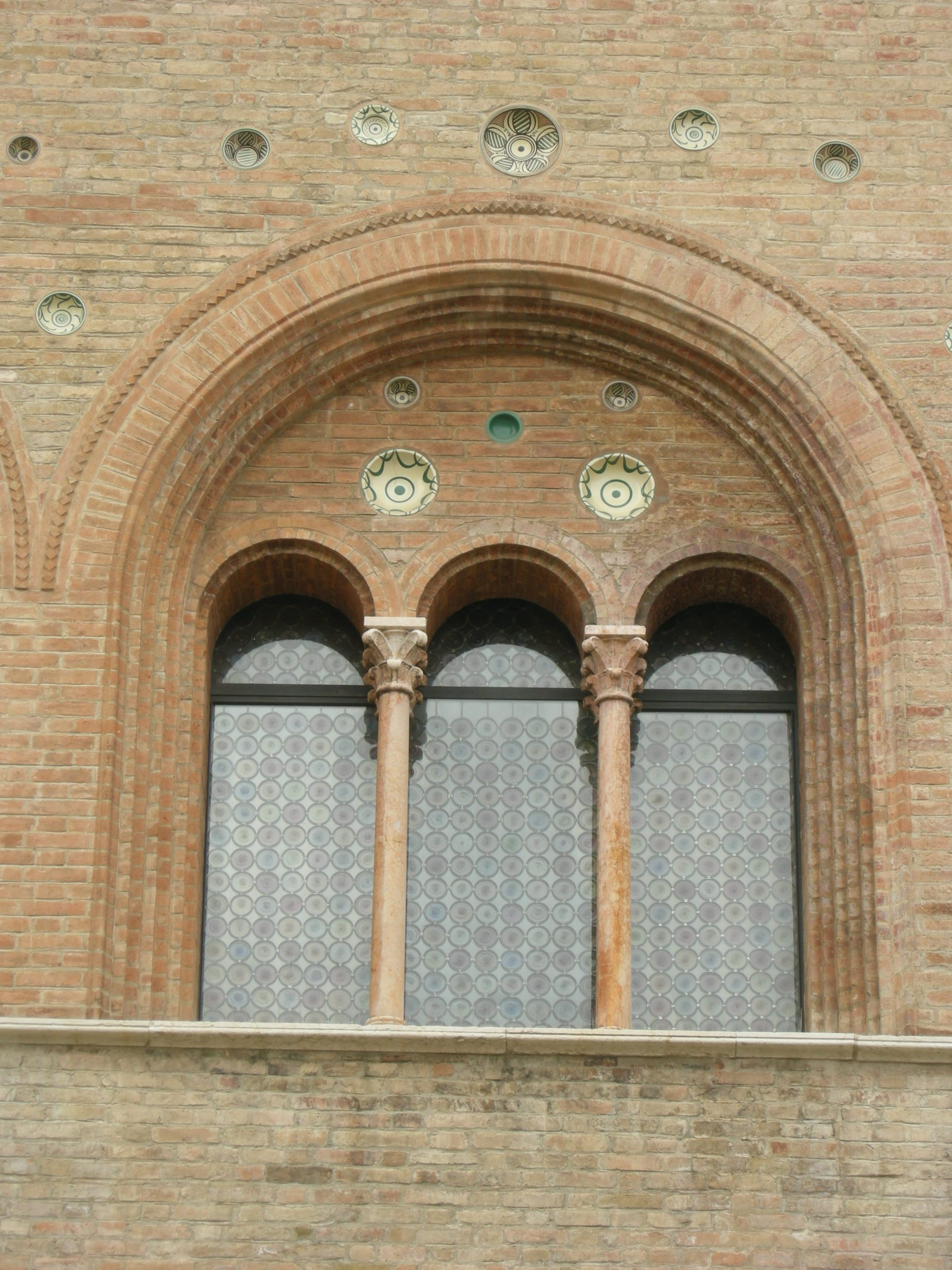 Parma, palazzo arcivescovile, bifora